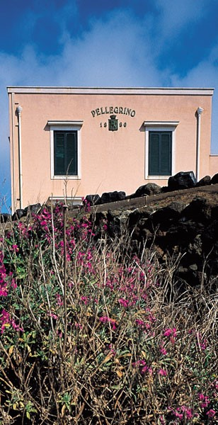 La cantina di Pantelleria della Carlo Pellegrino & C., realizzata nel 1992, è una struttura di vinificazione con 32 cisterne in acciaio inox, per una capacità di 10.760 hl. Al suo interno si producono i moscati e i passiti DOC.